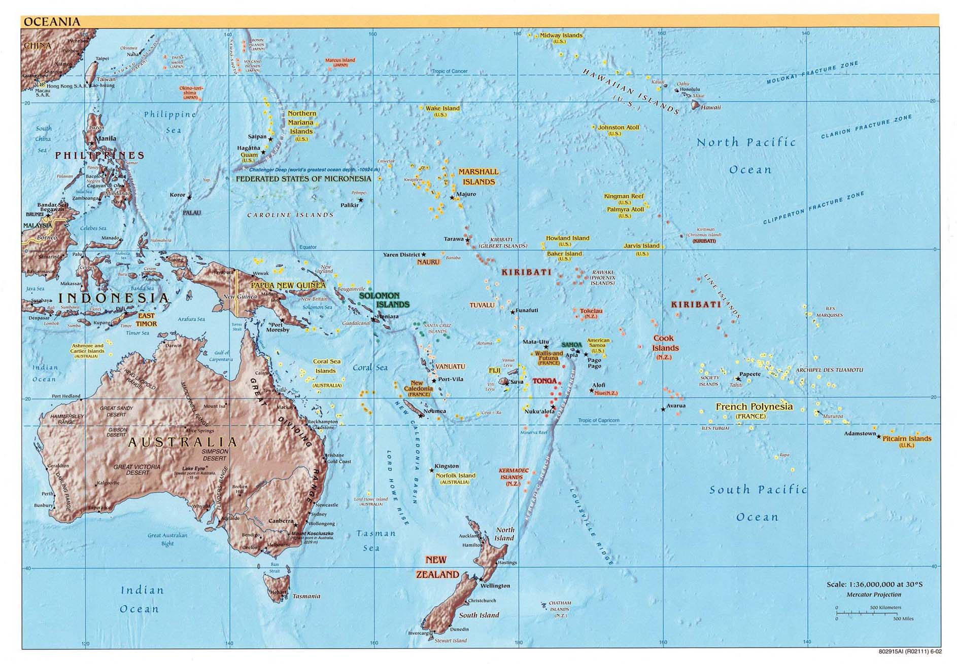 Referenze Karte Ozeaniens 2001